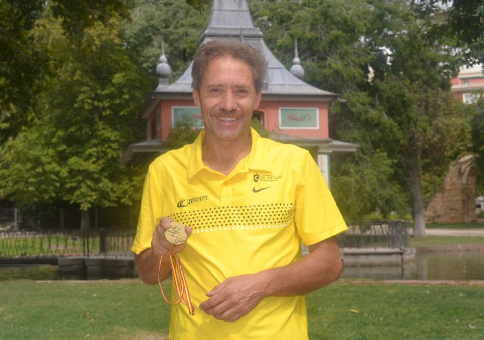 Ramiro Matamoros, atleta y fundador